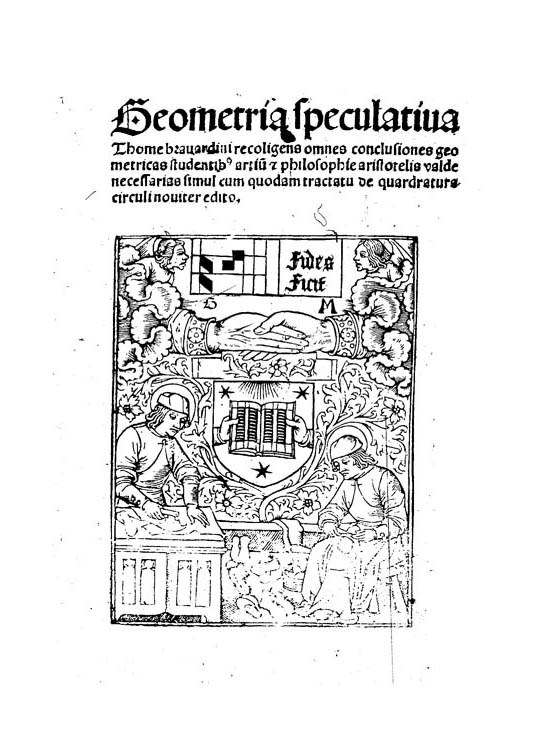 Geometria speculativa Thome brauardini recoligens omnes conclusiones geometricas. - [S. l. : s. n.], 1495 (parisi in campo gaillardi : … operaque Guidonis mercatoris diligentissime impressa …). - 22 c. ; 2°. - Segnatura: A-C6 D4. - ISTC ib01072000 ; Goff B1072; HCR 3712; Klebs 208.1; Pell 2812; CIBN B-754; Aquilon 174; Fernillot 153; Péligry 219; Zehnacker 546; IGI 2054; IBP 1227; IDL 1013; IBE 1161; Madsen 853; Günt(L) 2253; Voull(Trier) 2277; Voull(B) 4728; Sack(Freiburg) 800; Walsh 3620; Oates 2959; Rhodes(Oxford Colleges) 434; Pr 7997; BMC VIII 61; GW 5002 .